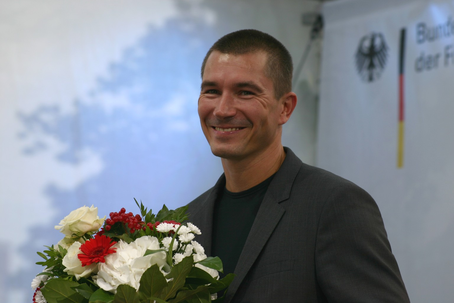 Der Radiomoderator Stefan Rupp während einer Veranstaltung zum Tag der offenen Tür im Bundesfinanzministerium Berlin, 2012.